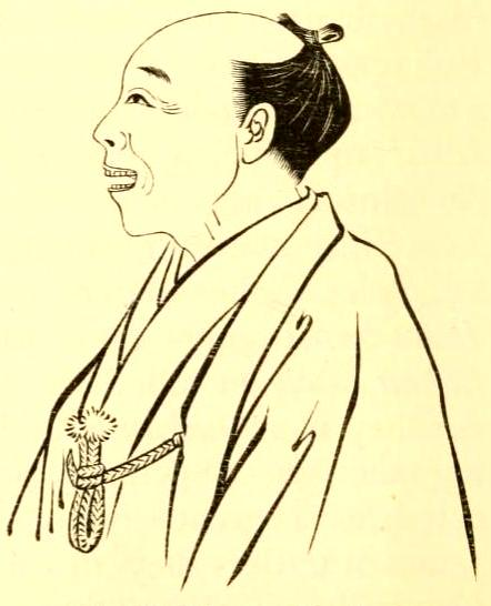 幇間。豆本田髷。